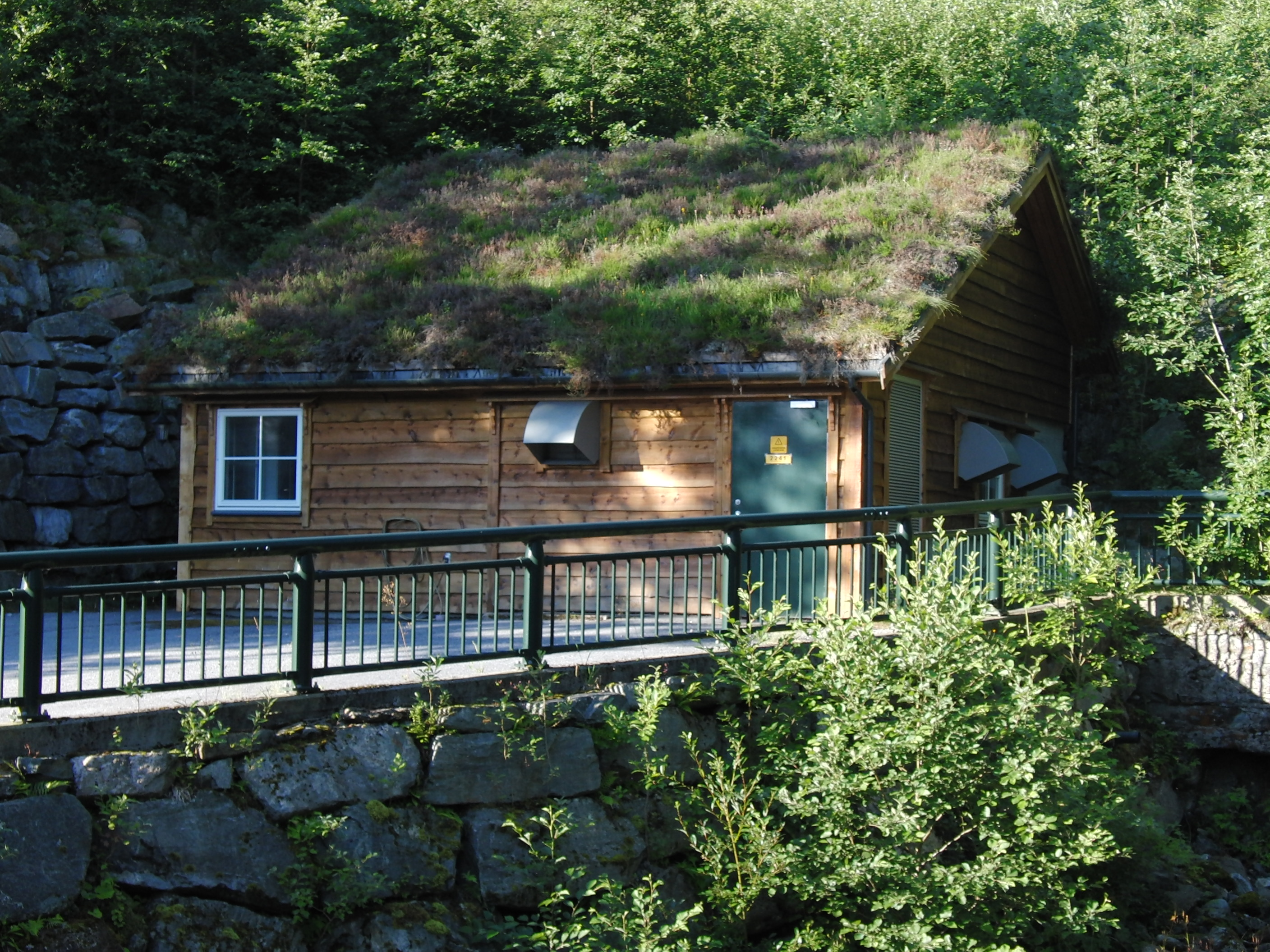 Folkestad kraftverk